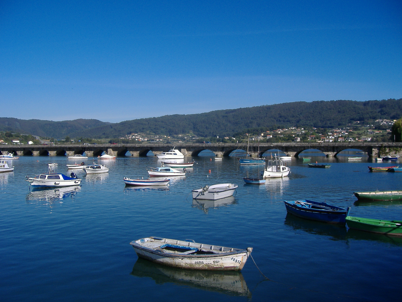 Pontedeume, desembocadura do río Eume e ponte que comunica Cabanas e Pontedeume.